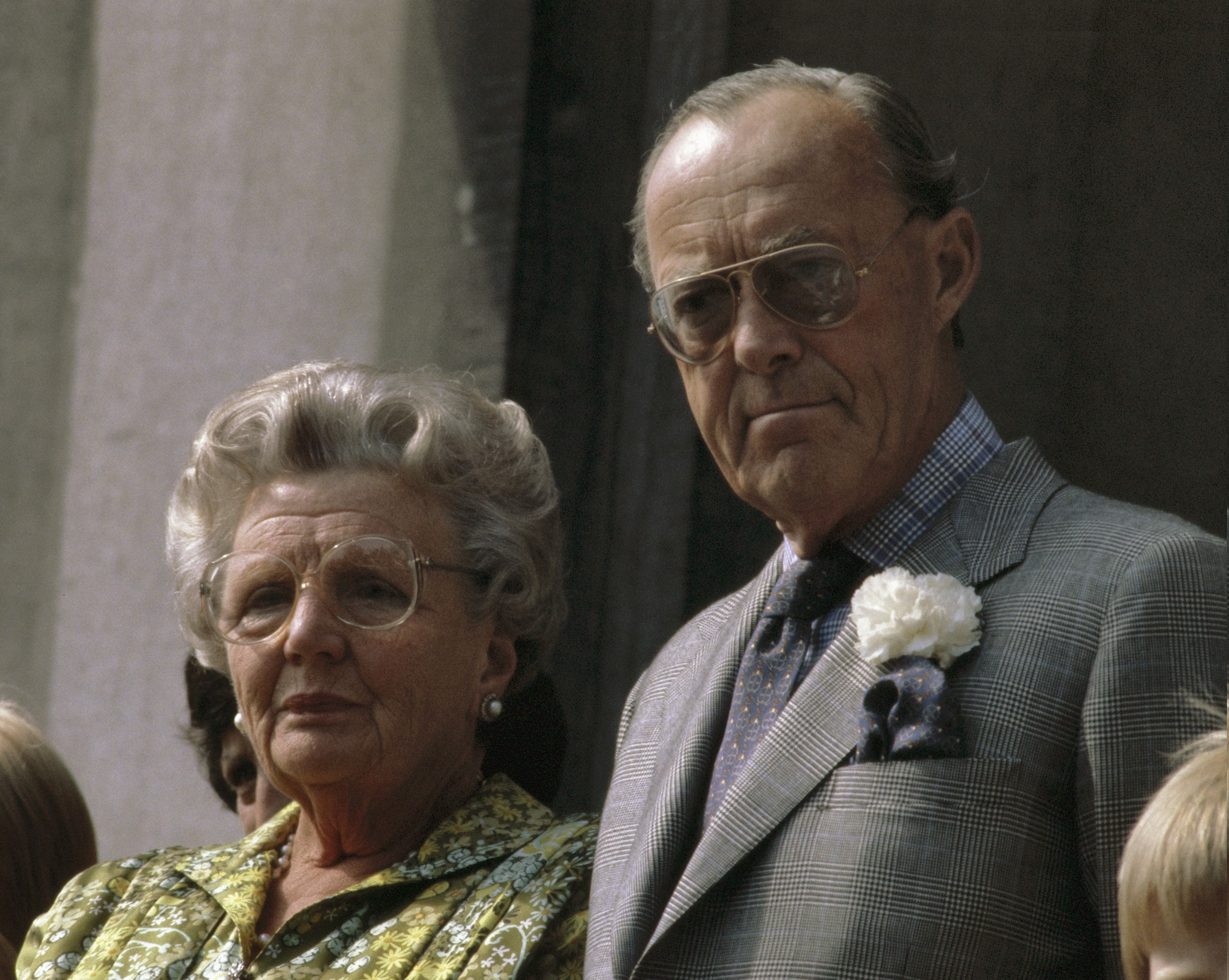 Laatste defile voor Prinses Juliana op Soestdijk; Prinses Juliana en Prins Bernhard , koppen